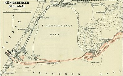 Karte der Fischhausener Wiek im Südwesten des Samlandes. An der Grenze zum Frischen Haff verläuft der Königsberger Seekanal.